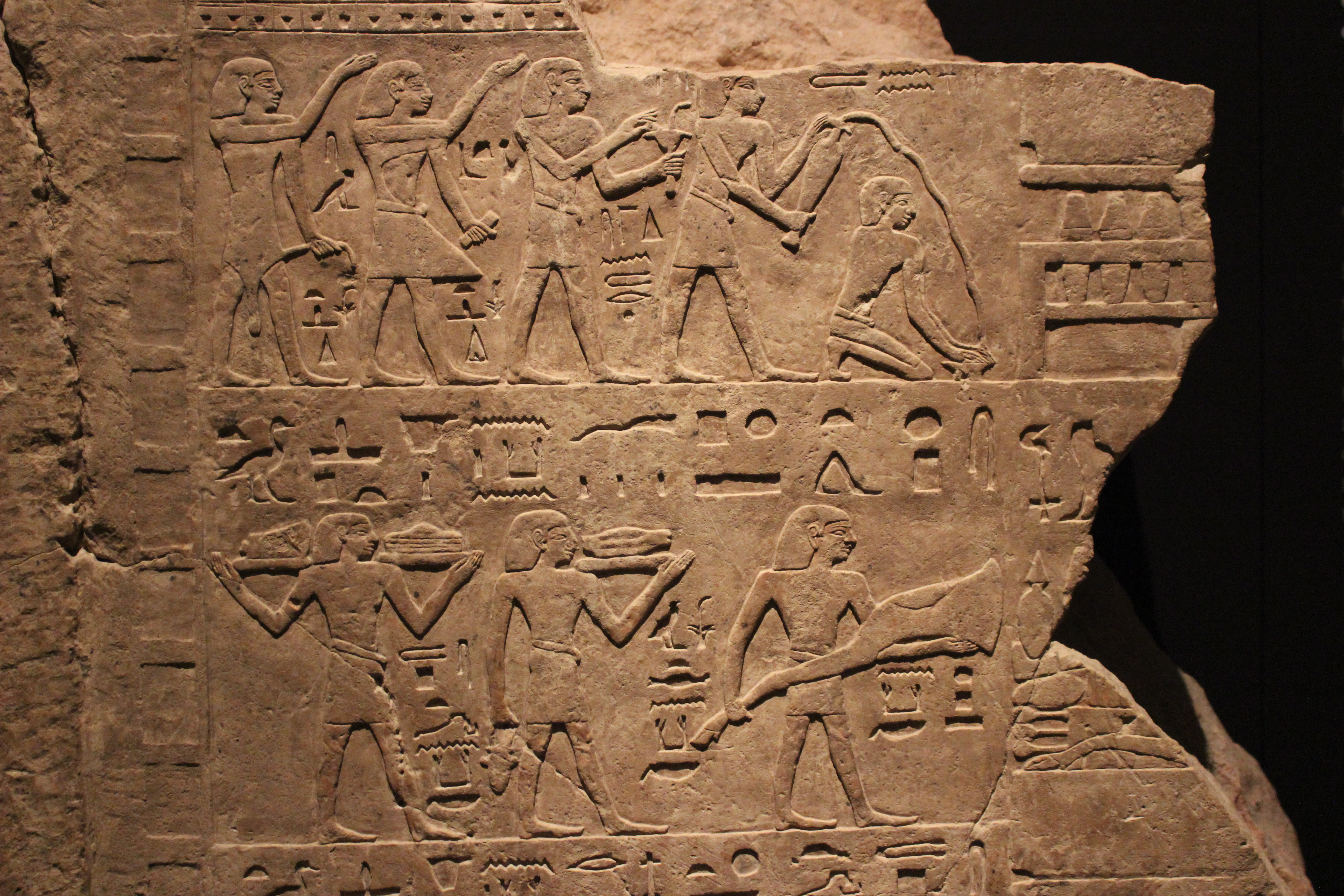 Madrid. Museo Arqueológico Nacional. Estela procedente de Heracleópolis Magna. Primer período intermedio.